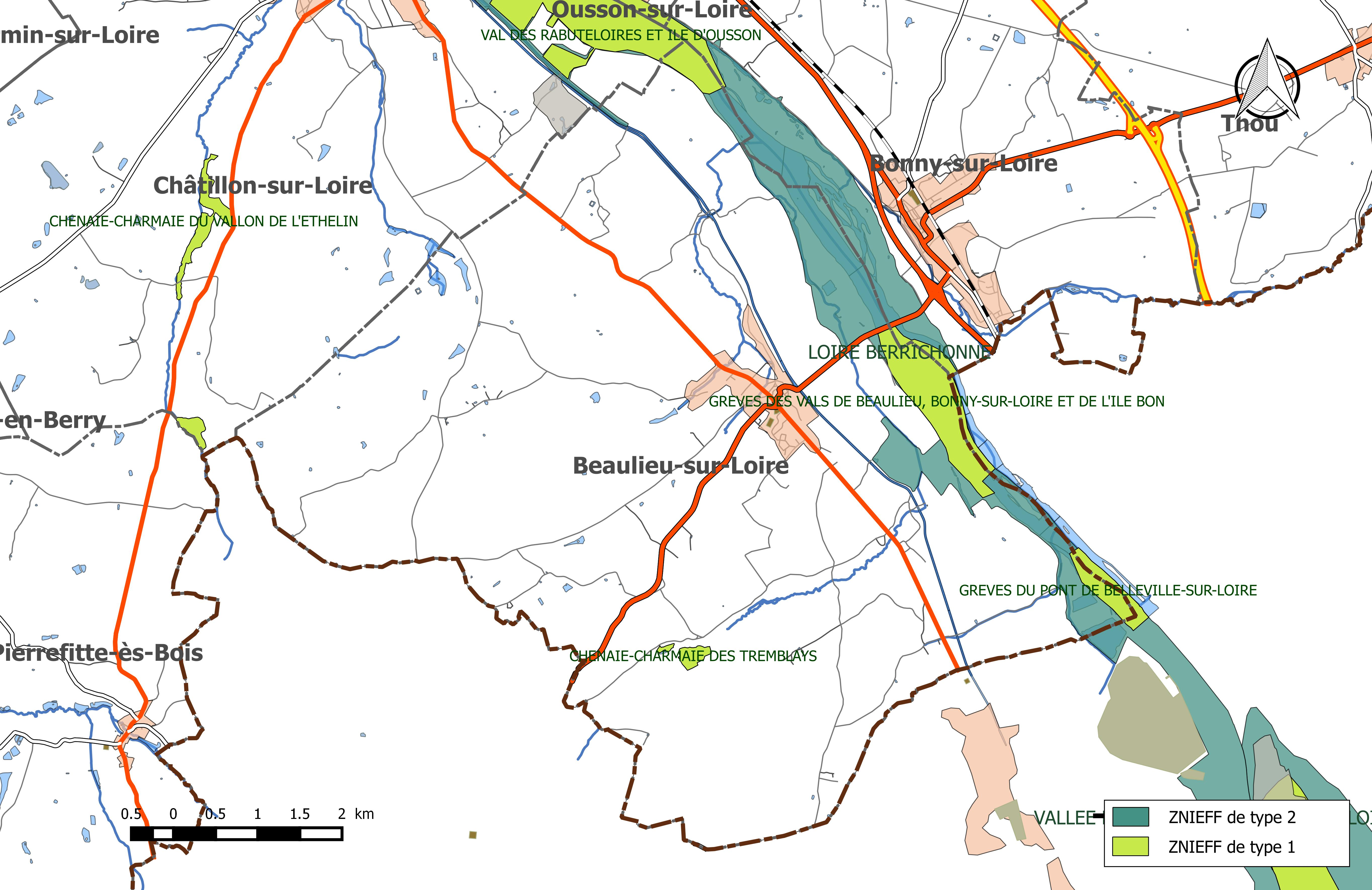 Carte des Zones naturelles d'intérêt écologique faunistique et Floristique (ZNIEFF) de la commune de Beaulieu-sur-Loire.